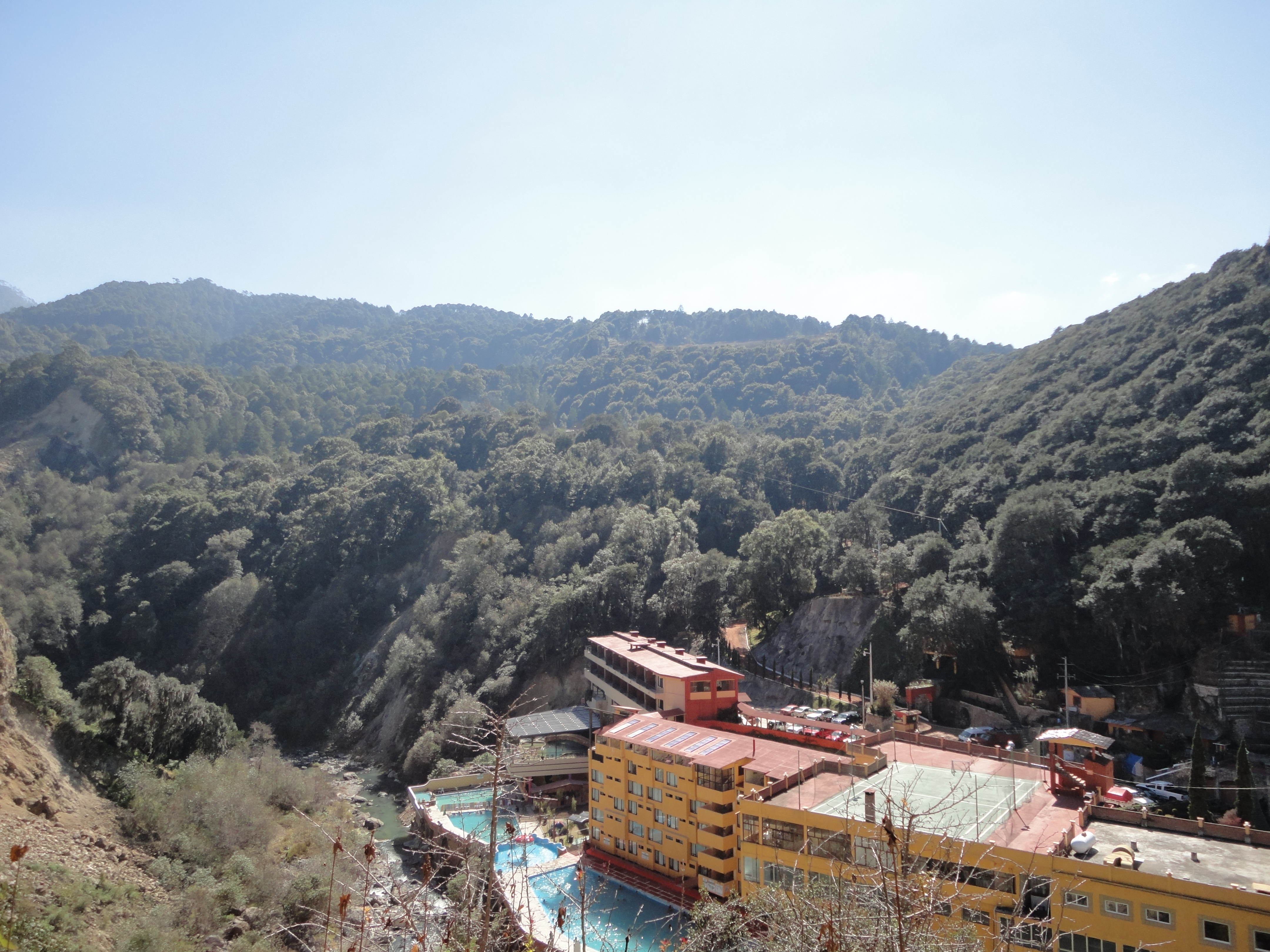 Balneario termal y hotel